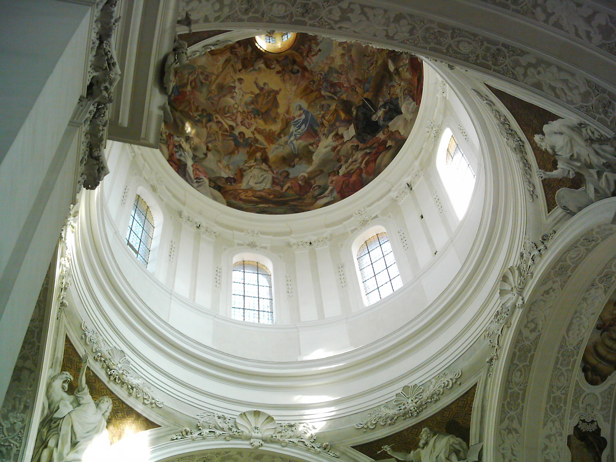 Kuppel der Basilika St. Martin in Weingarten (Württemberg), Oberschwaben, Lkr. Ravensburg, Deutschland